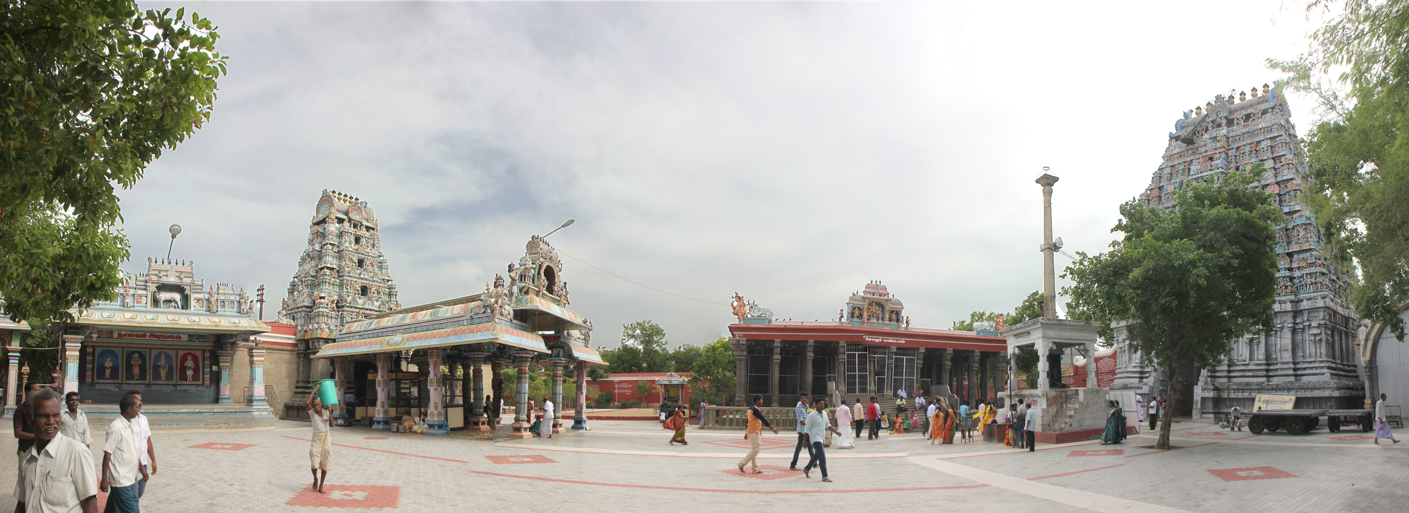 ஒரு திருமணத்திற்கு புகைப்படம் எடுக்க சென்றபொழுது இந்த கோவில் படம்பிடிக்கப்பட்டது.